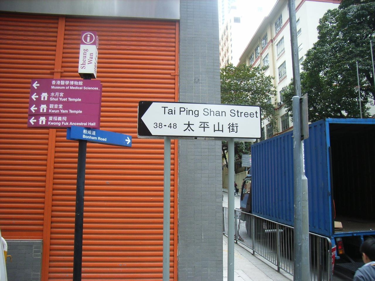 香港zh:上環zh:太平山街, 近zh:普仁街 東華醫院路口 (Tai Ping Shan Street, Sheung Wan, HK)